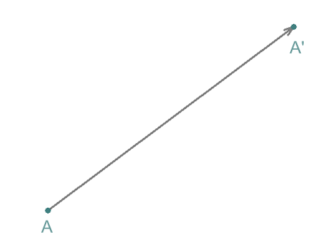 Traslación, isometría, transformaciones isométricas, geometry